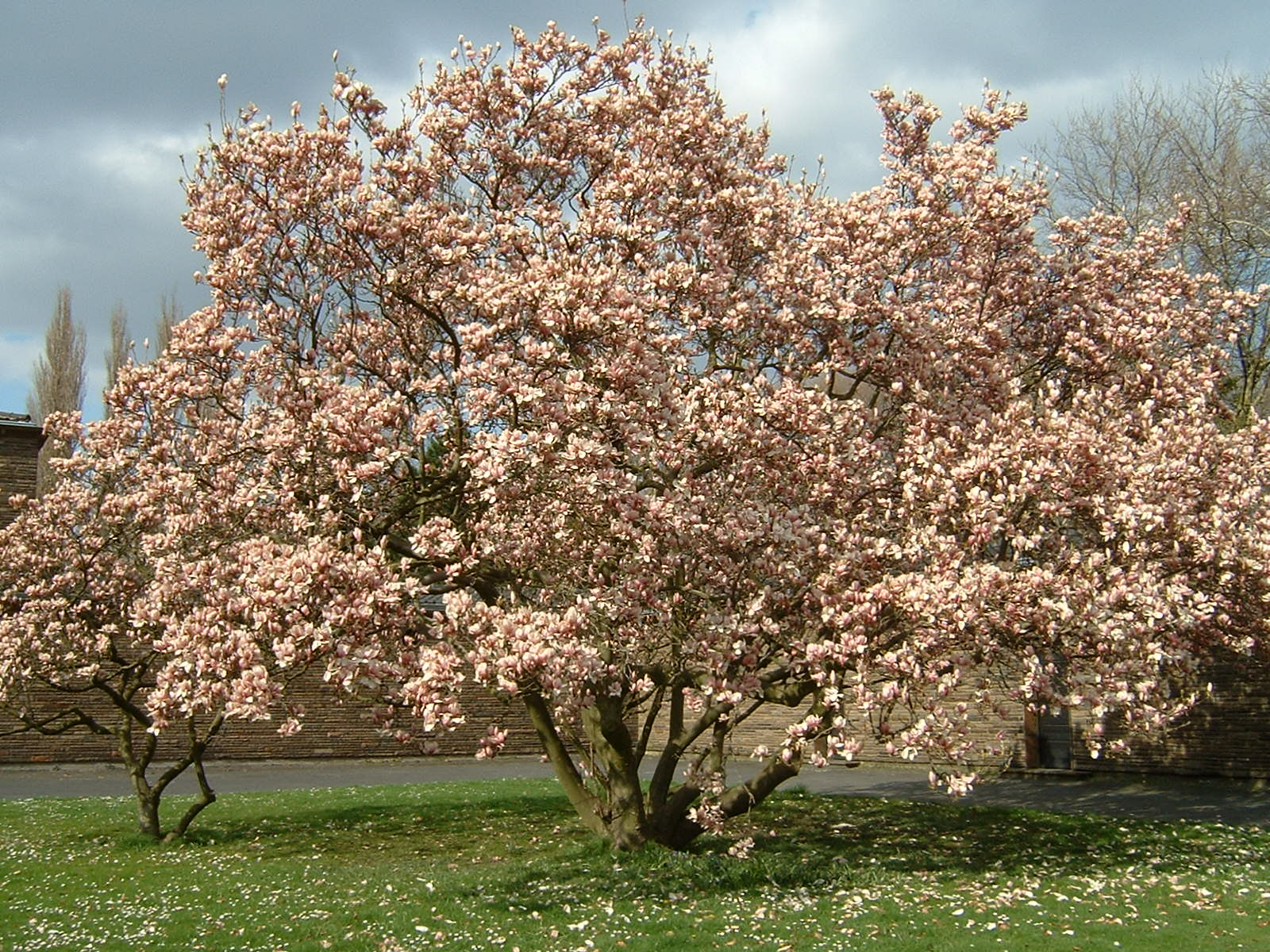 Bildbeschreibung: Magnolienblüte in Bochum Quelle: selbst gemacht Fotograf/Zeichner: Harald Köster, Bochum, Germany Datum: March 2004